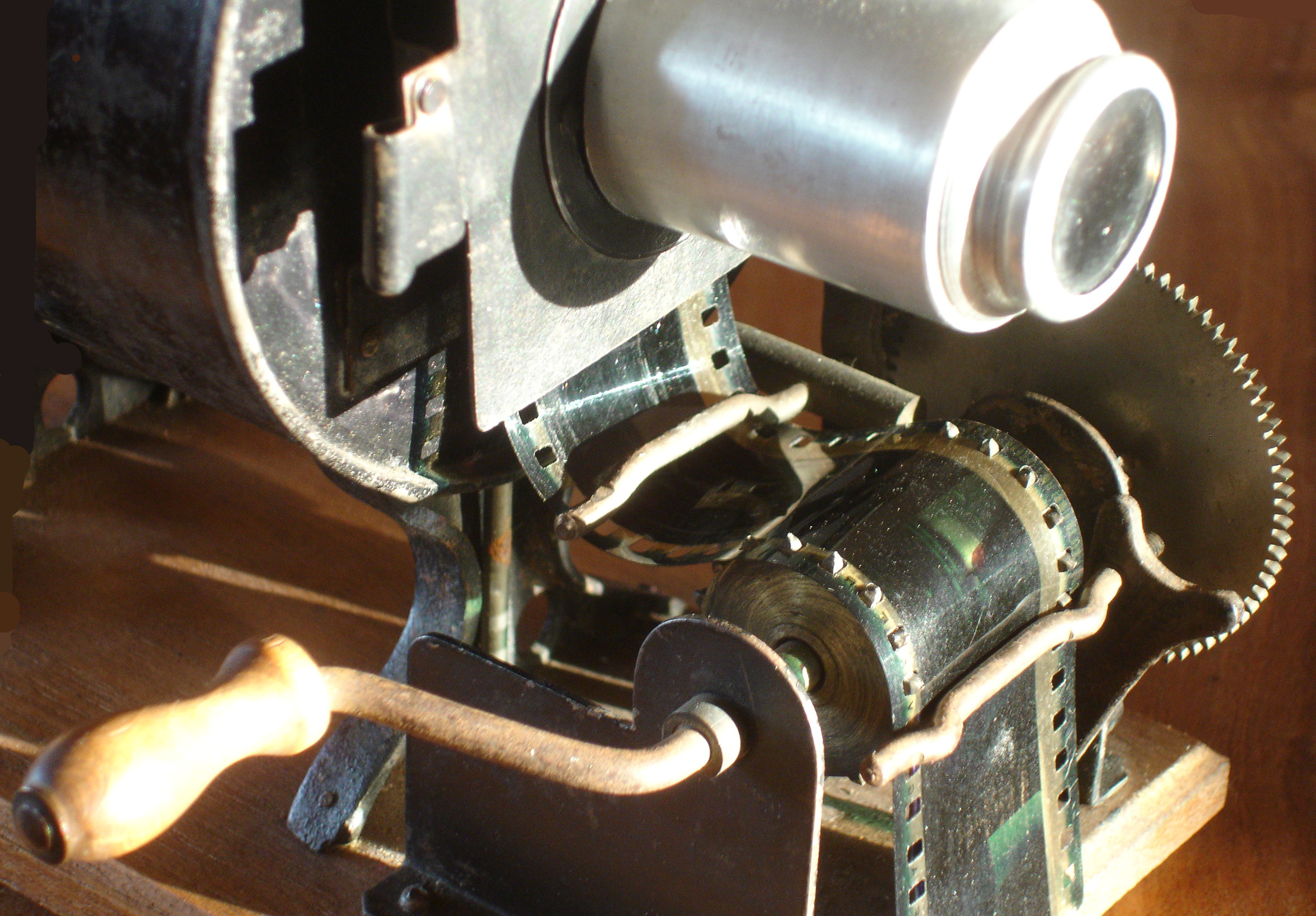 Description du fonctionnement d'une came battante, utilisée aux débuts du cinéma aussi bien pour des appareils de prise de vues que pour des appareils de projection. Ici, illustration n°1 sur un Jacko Ciné 35mm.